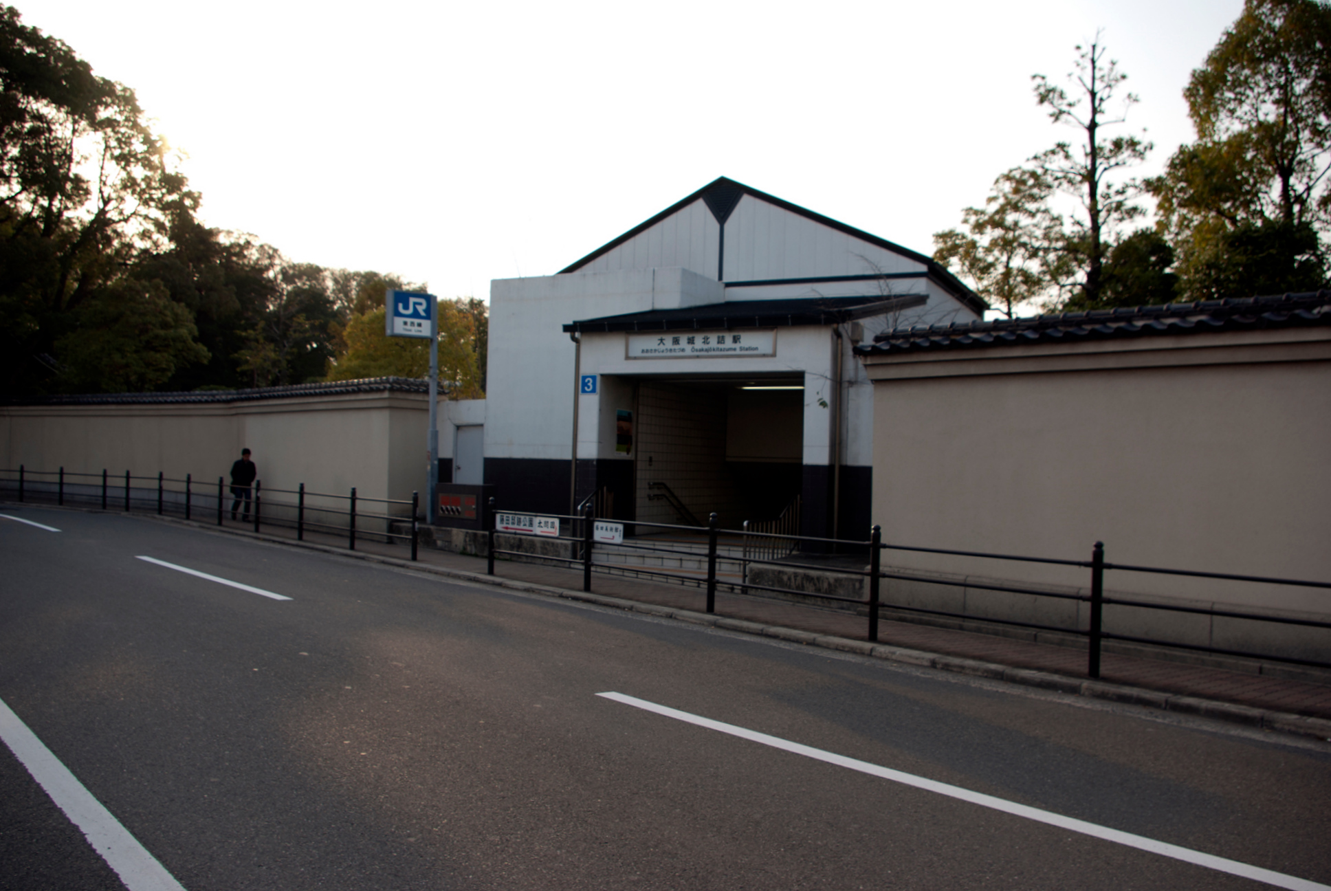 西日本旅客鉄道株式会社東西線大阪城北詰駅